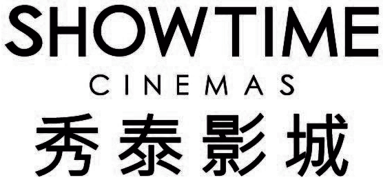 秀泰影城